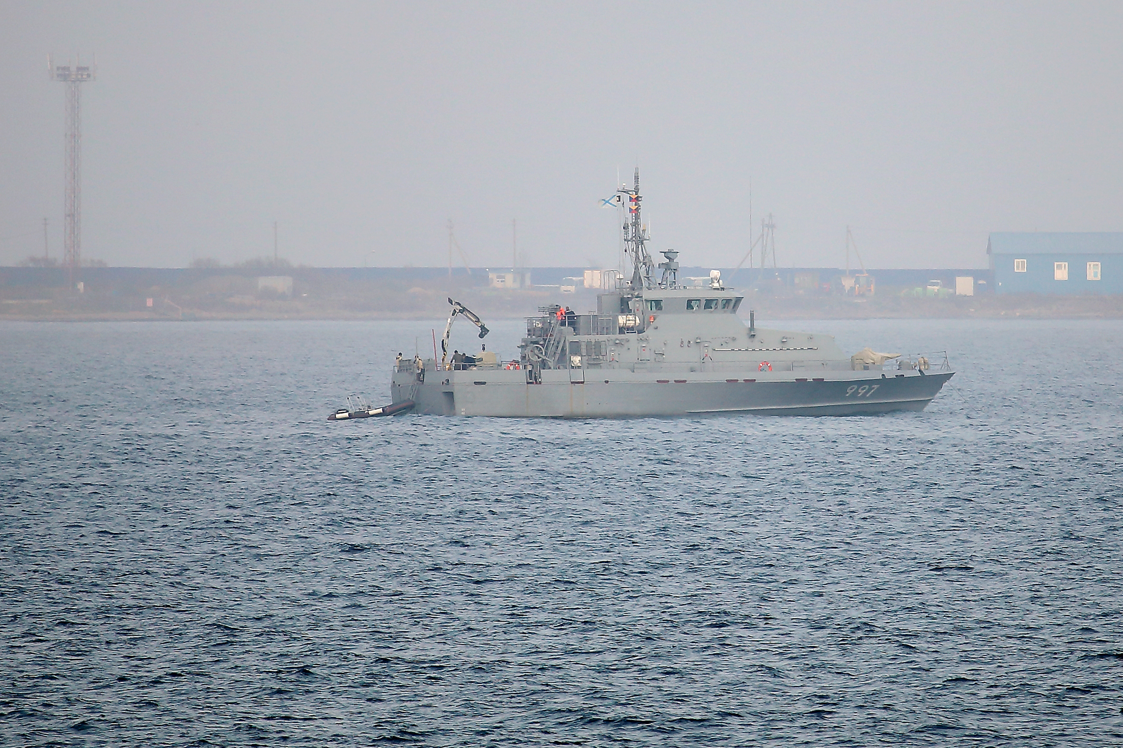 Граченок на ходовых испытаниях в заливе Петра Великого